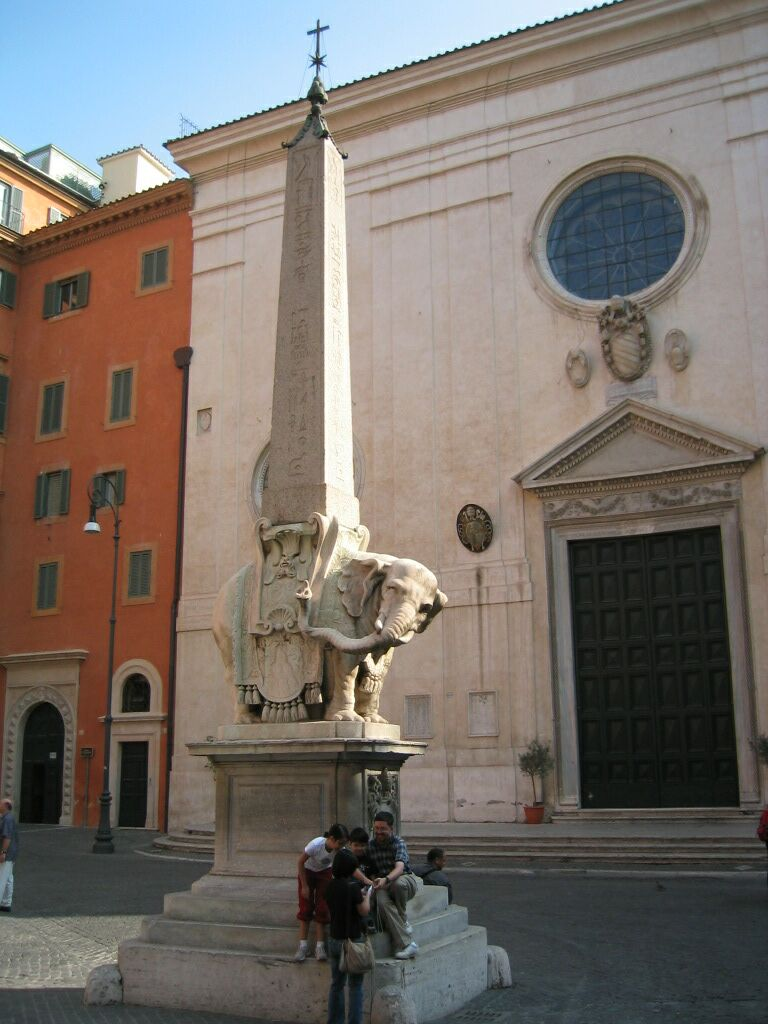 Berninis Elefant vor St. Maria sopra Minerva in Rom.